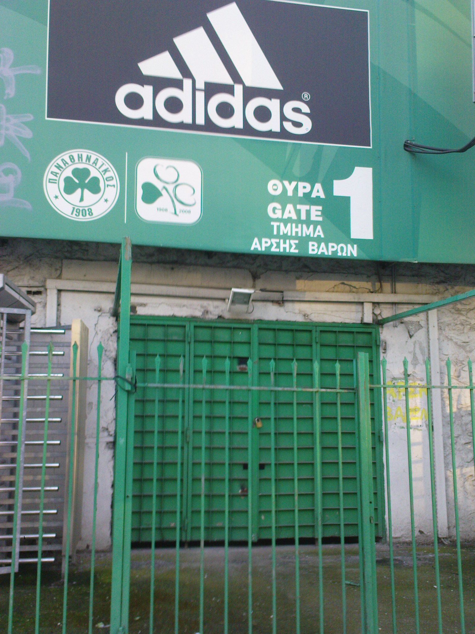 H είσοδος για το προπονητήριο της άρσης βαρών του Παναθηναϊκού στη θύρα 1 του Γηπέδου της Λεωφόρου